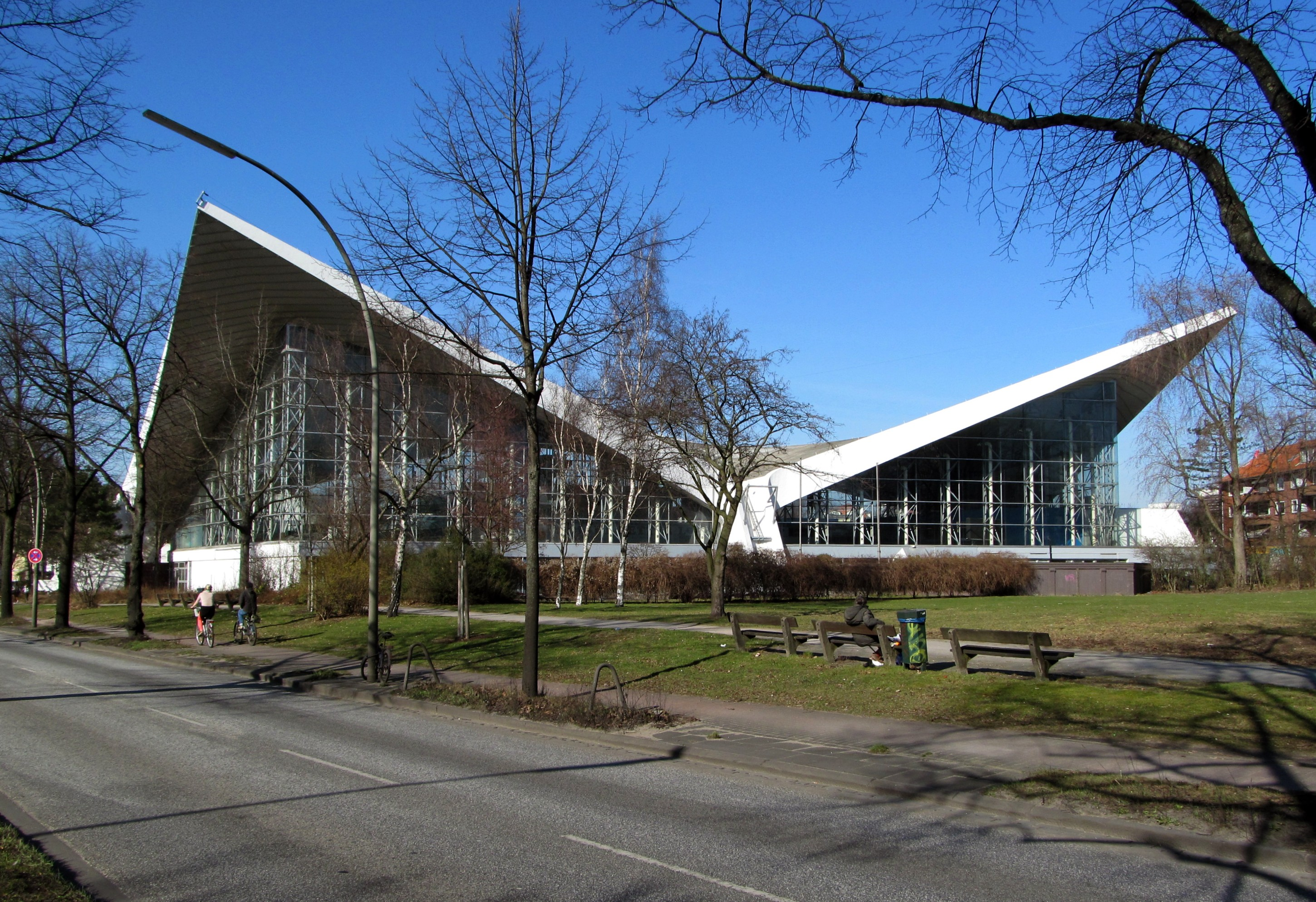 Alsterschwimmhalle in Hamburg, Ansicht von Süden This is a photograph of an architectural monument. It is on the list of cultural monuments of Hamburg, no. ...